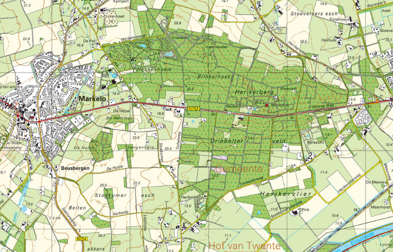 Topografische kaart van de Herikerberg, schaal: 1:16.181